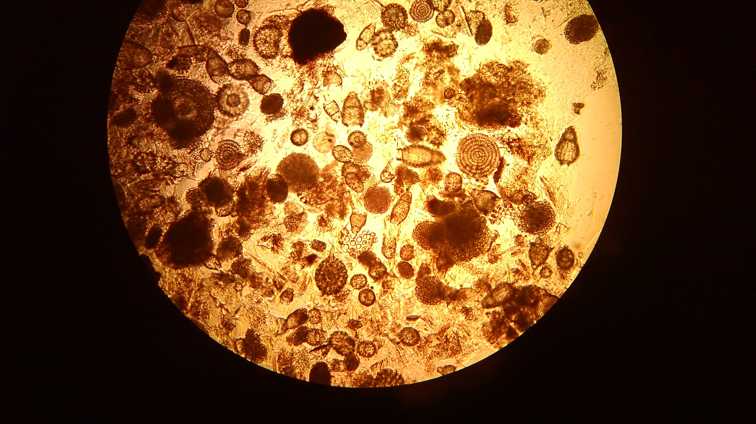 Tintínidos